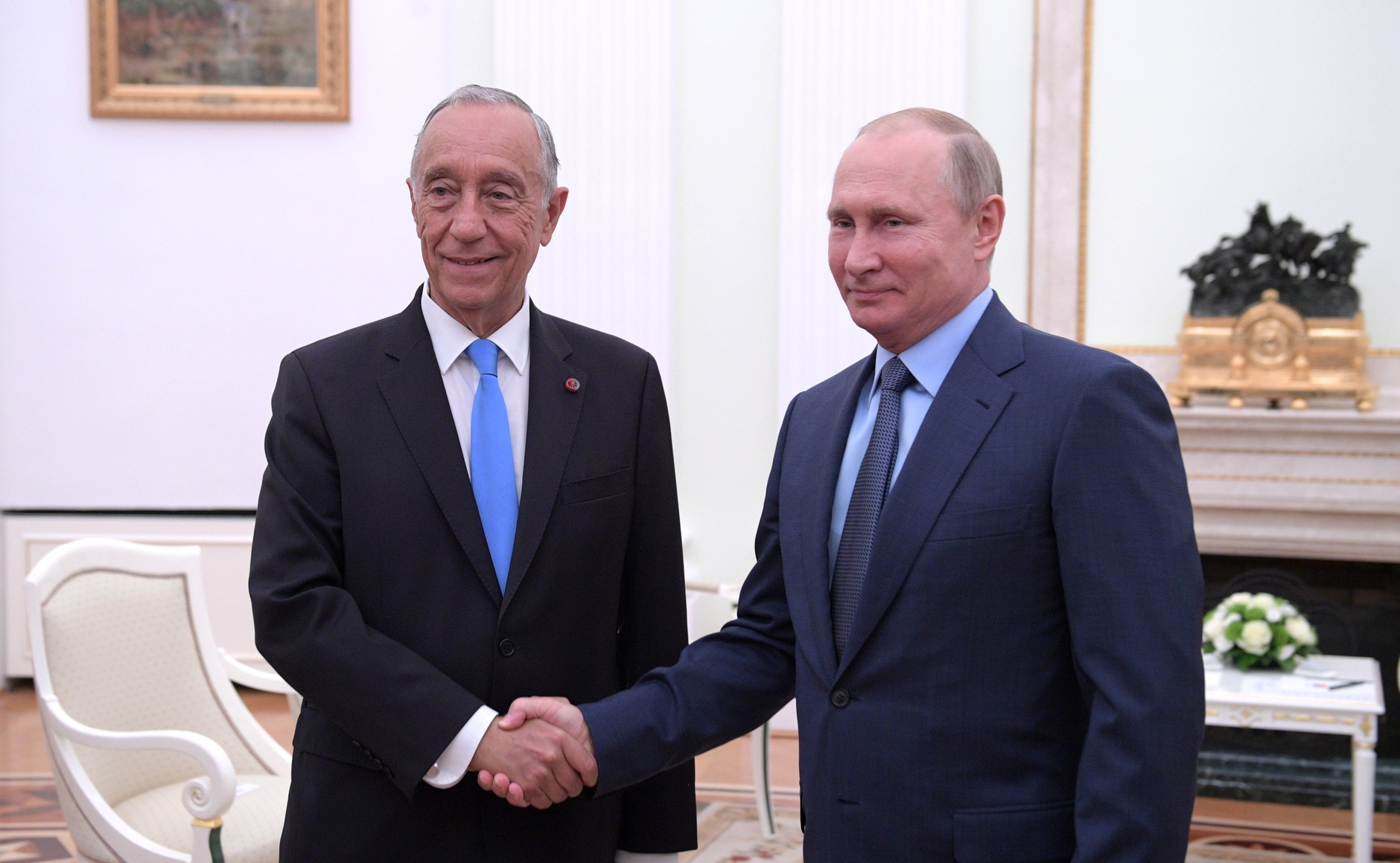 С Президентом Португалии Марселу Ребелу де Соузой.